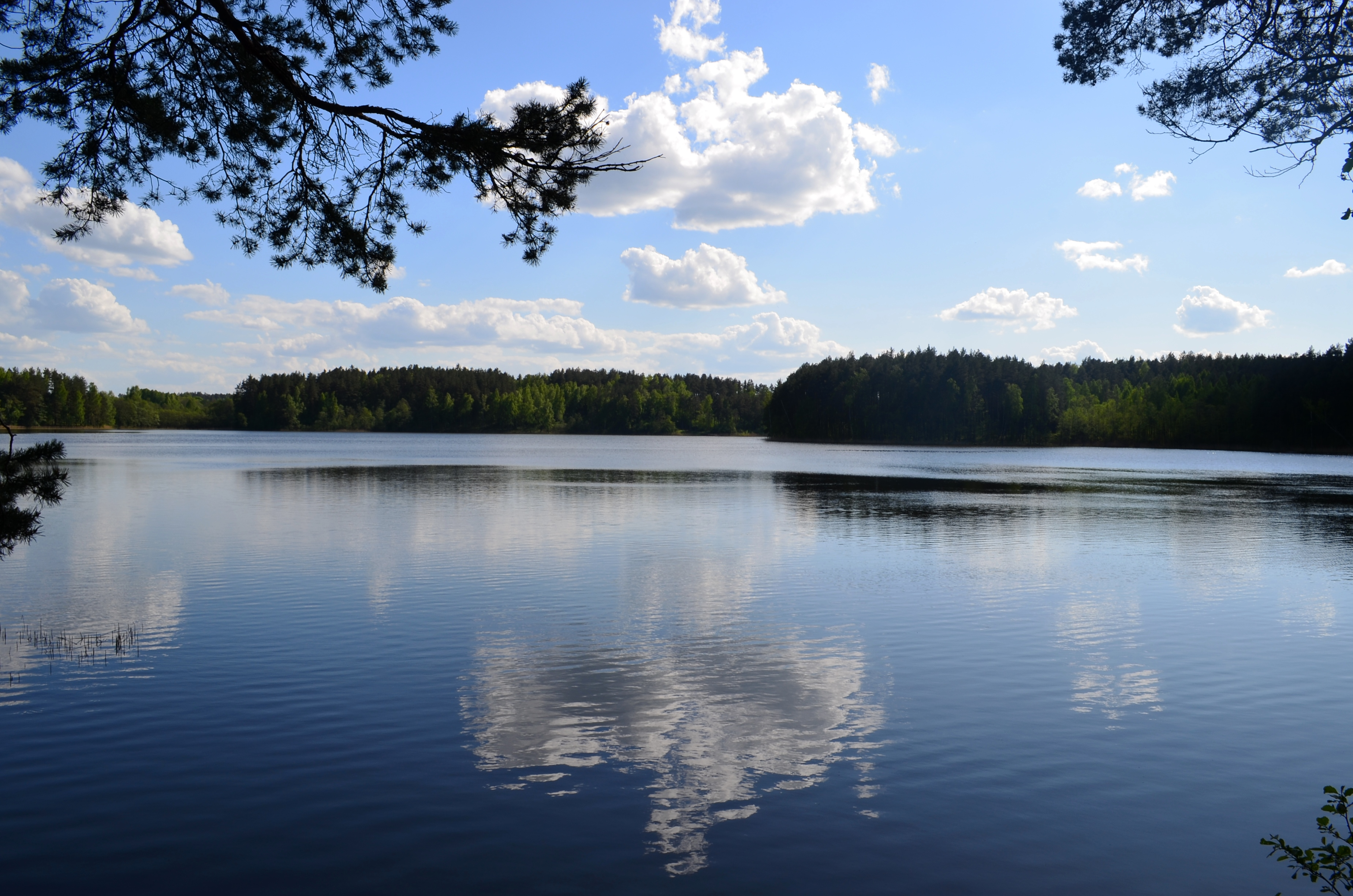 Ežeras Rudesa (prie Išdagų) nuo šiaurinio kranto, Inturkės sen., Molėtų raj.